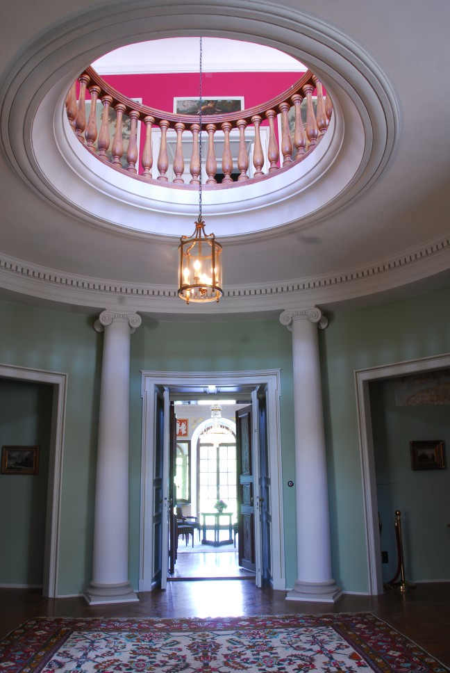 Vestibül Hornjoserbsce: W Hušćanskim hrodźe.